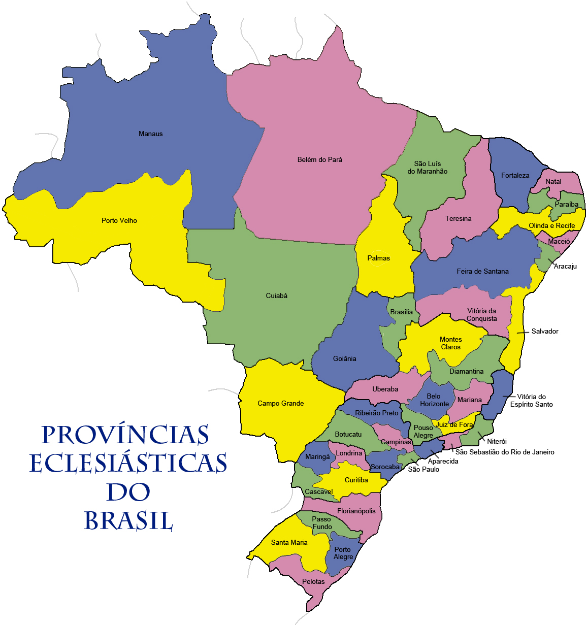 Mapa das províncias eclesiásticas brasileiras.